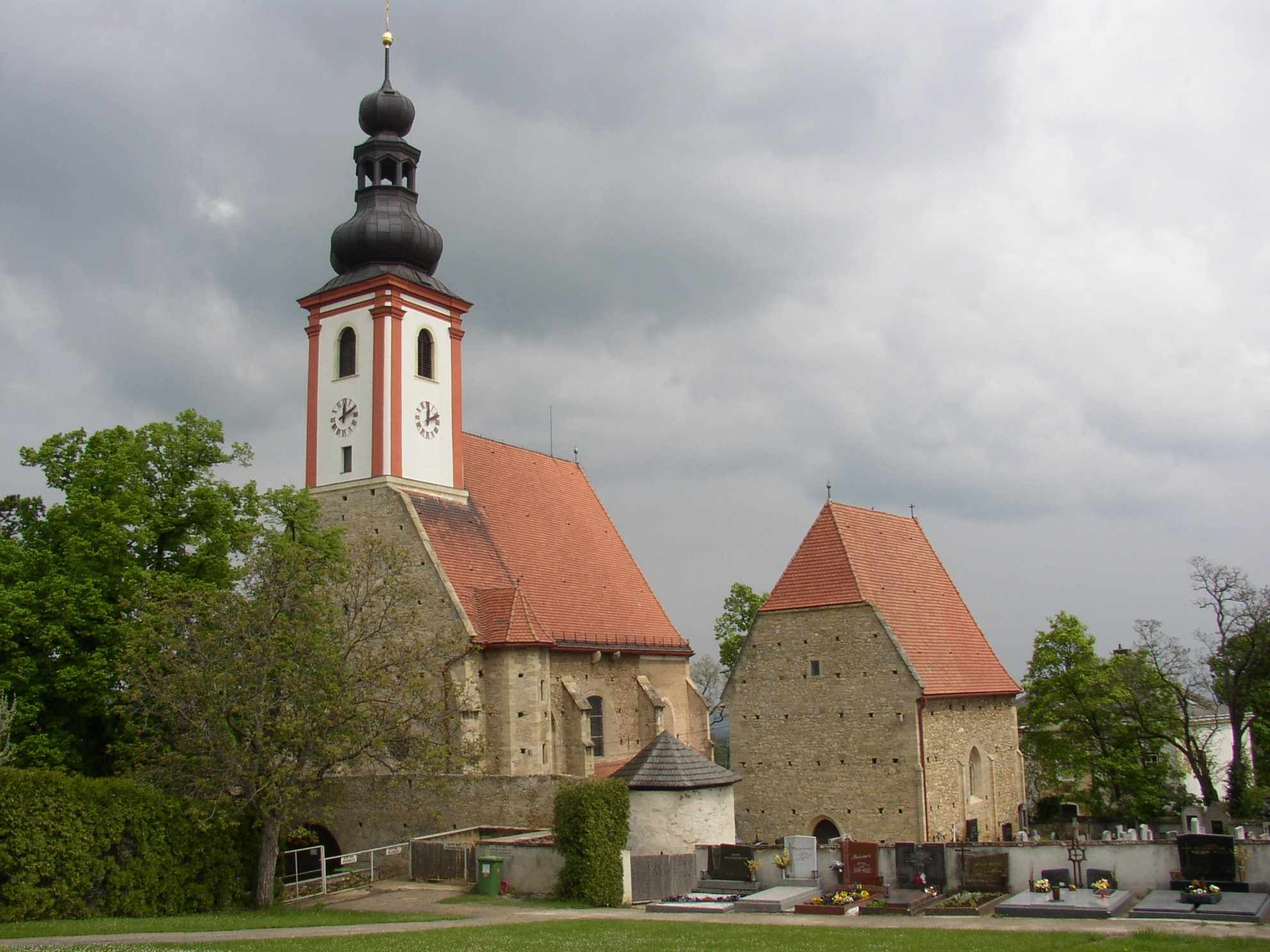 Spätgotischer Wehrkirchenbezirk in Würflach. Links die Pfarrkirche St. Anna, daneben die Kapelle St. Sebastian, davor ein noch erhaltener Teil der Wehrmauer